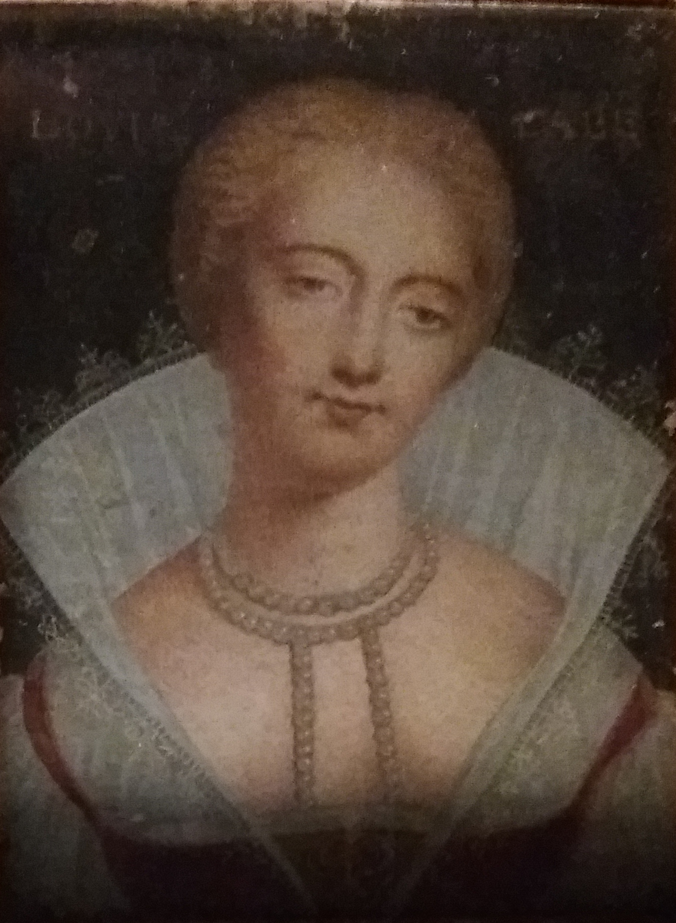 Louise Labé, poétesse lyonnaise. Huile sur parchemin anonyme, fin XVIIIe début XIX{e siècle. Musées Gadagne. Iventaire 004.3.1.